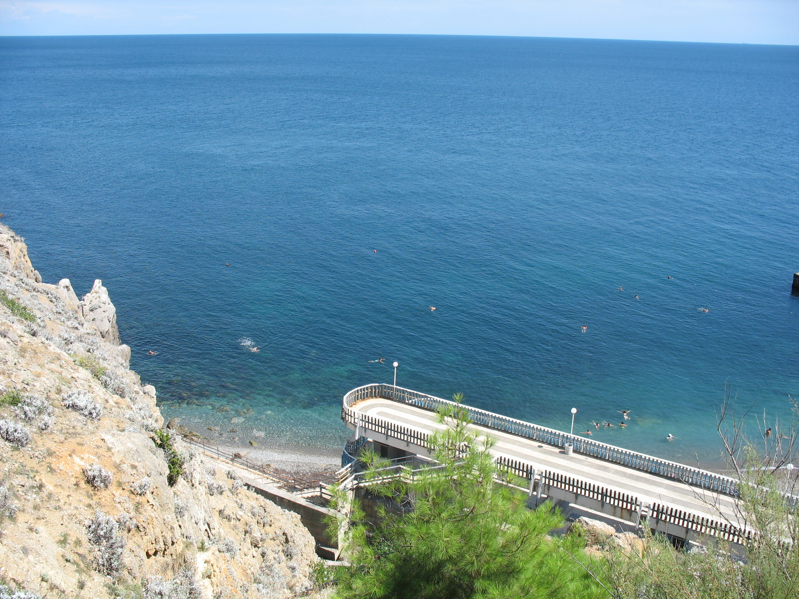 Море у Ласточкиного гнезда.JPG